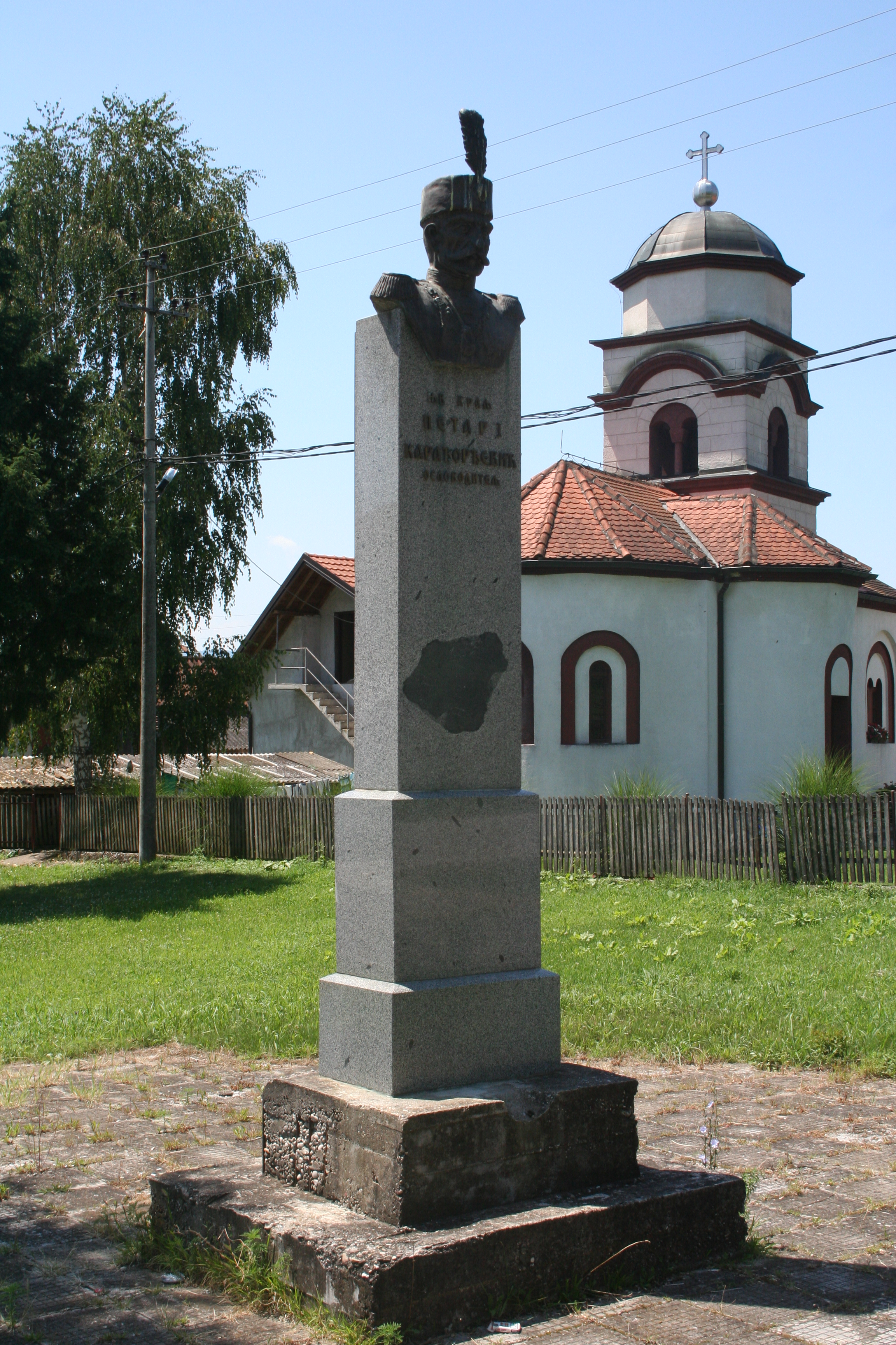 Spomenik kralju Petru I Karađorđeviću i poginulim ratnicima I sv. rata, Bradić